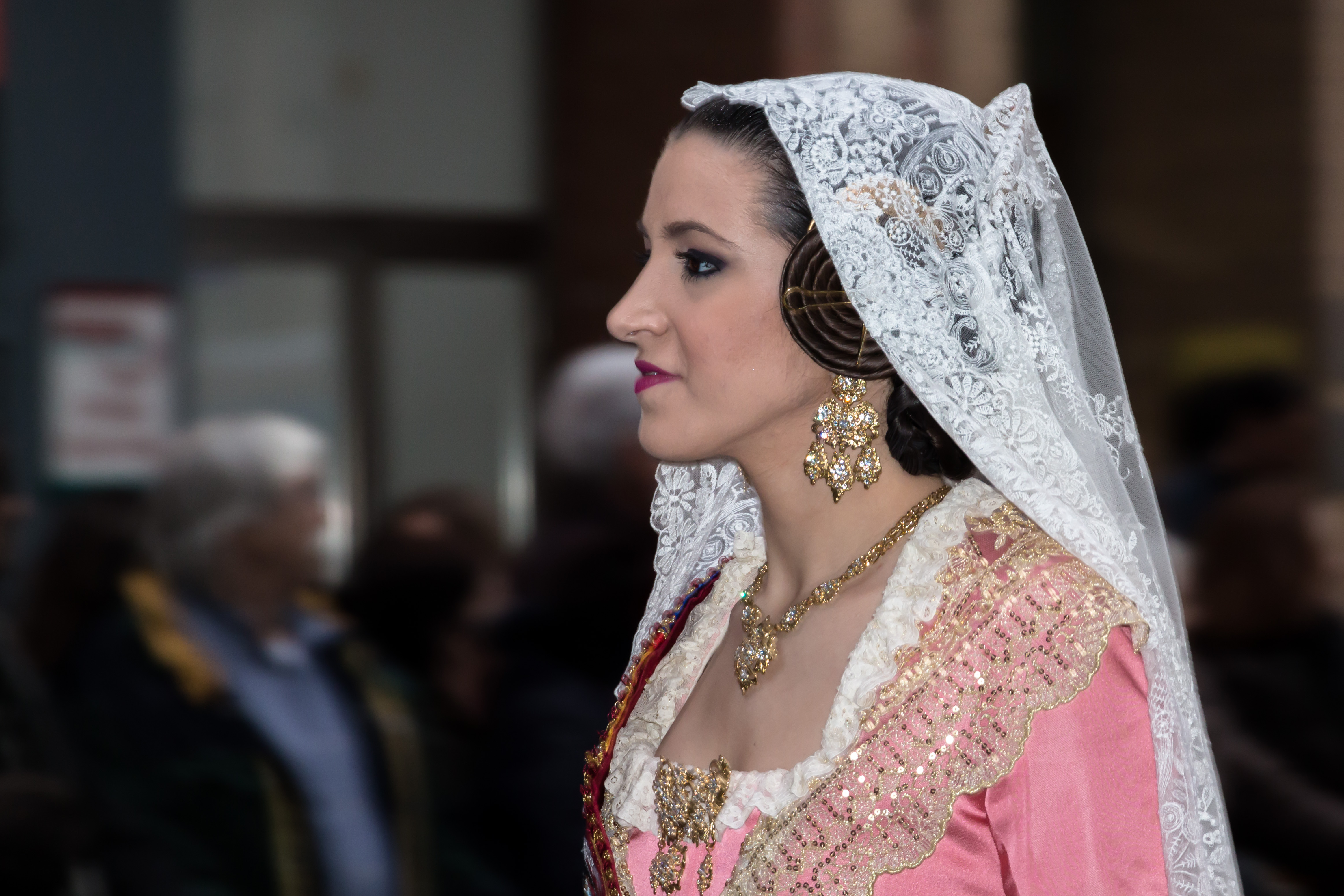 Falleras desfilando hacia la plaza de la Virgen durante la Ofrenda de Flores This is a photography of a Folklore festival in Spain (Wikidata id Q1143768).